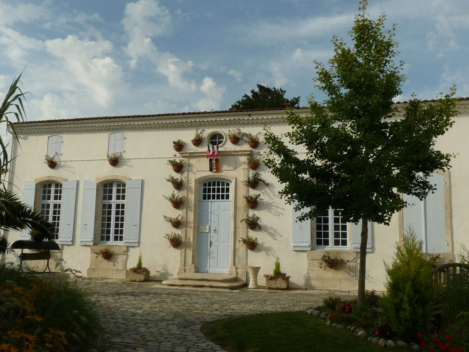 mairie de Semussac (17), France